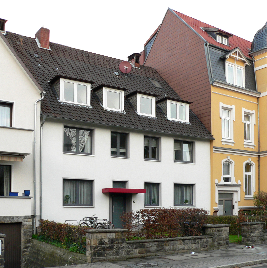 Standort des früheren Wohnhauses von Kurt Schwitters, kriegszerstört und Neubau, rechts ein erhaltener Altbau aus der Zeit vor dem Zweiten Weltkrieg